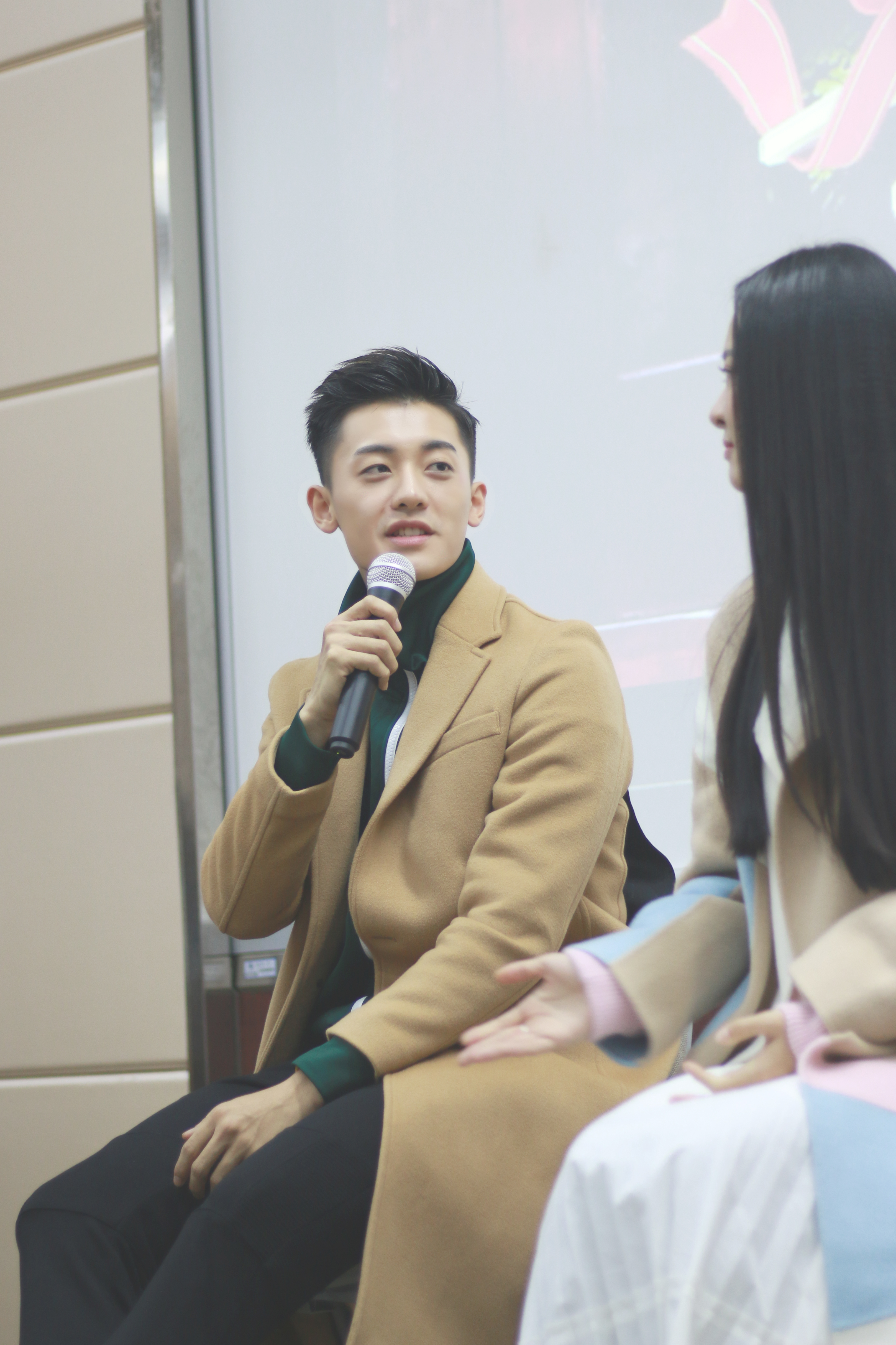 中文（中国大陆）: 2016年11月10日，赵志伟、李莎旻子在武汉大学出席《一年级》看片会。